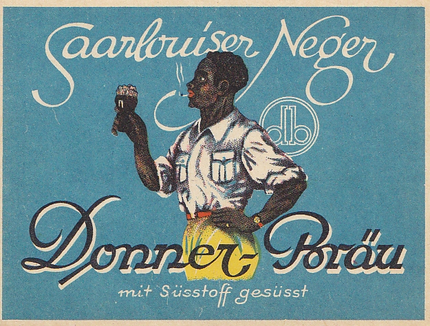 Werbeplakat für Vortrag Rodena Seniorenforum Ende Januar 2010